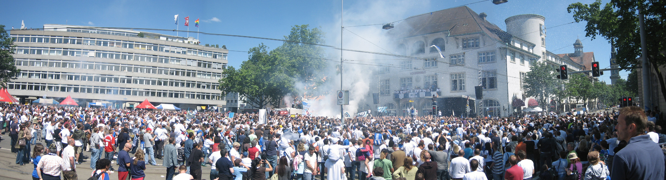 FCZ Meisterfeier beim Volkshaus / Helvetiaplatz